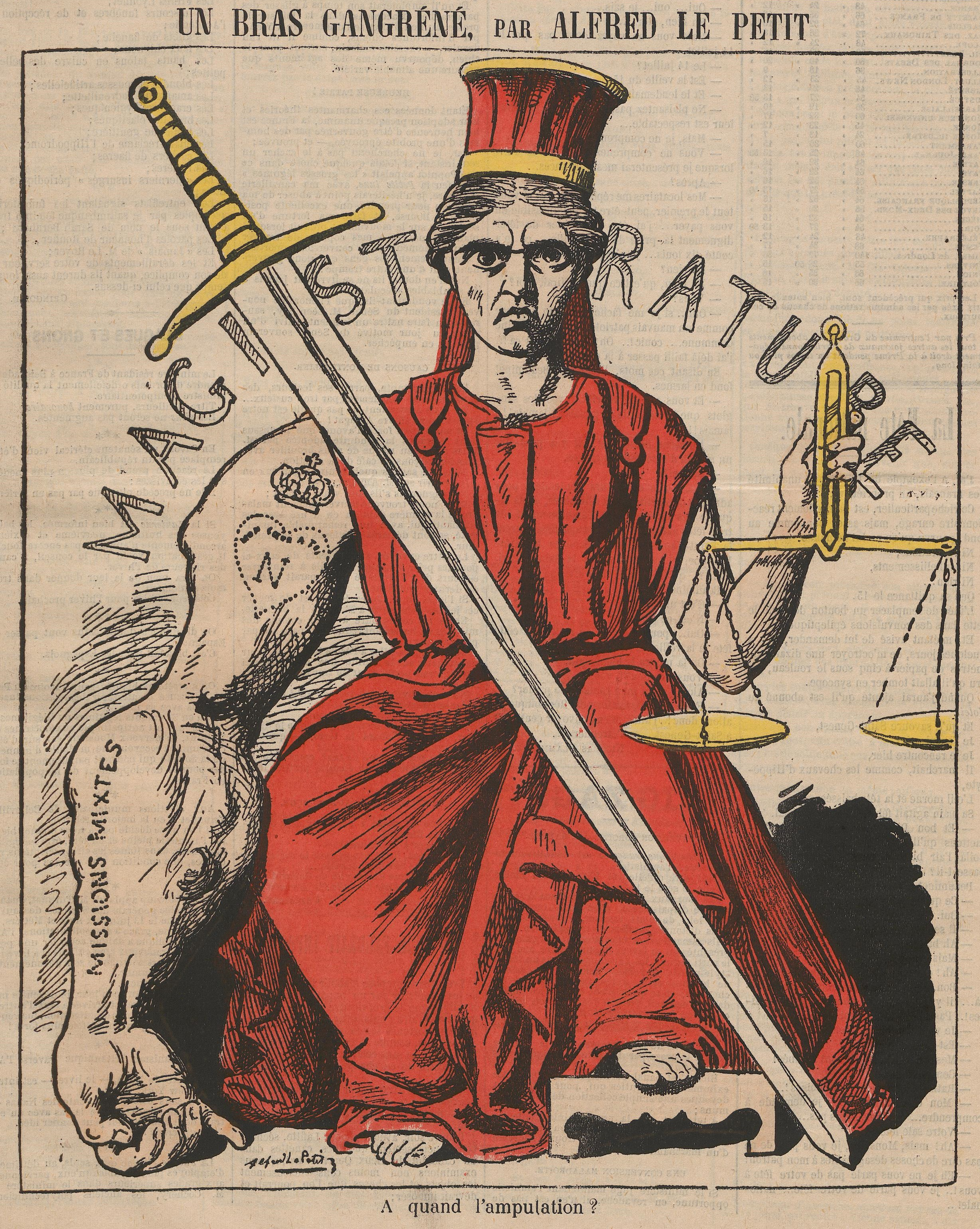 "Un bras gangréné".